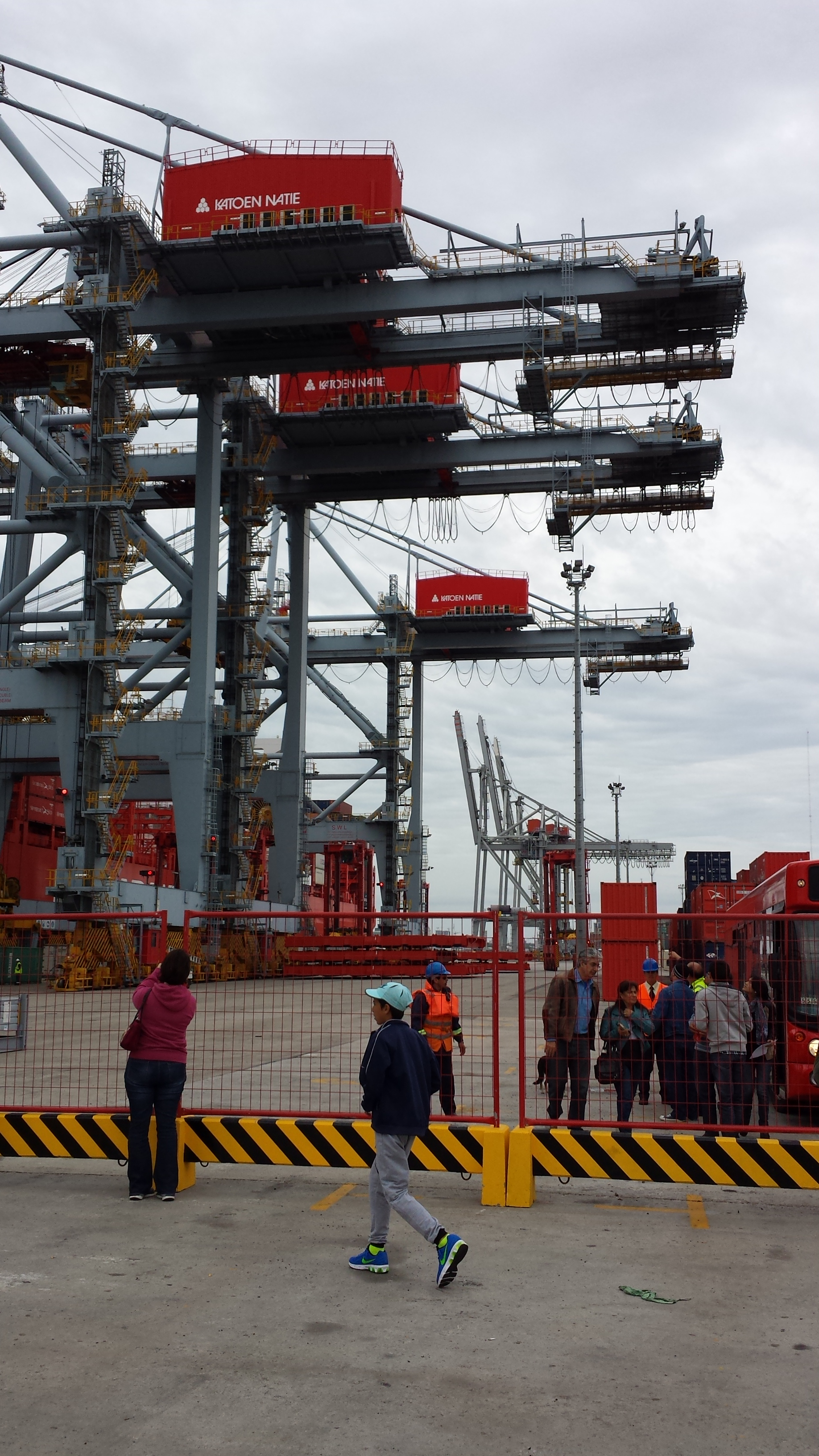 Las grúas operando en la carga de un barco porta contenedores en el puerto de Montevideo, Uruguay